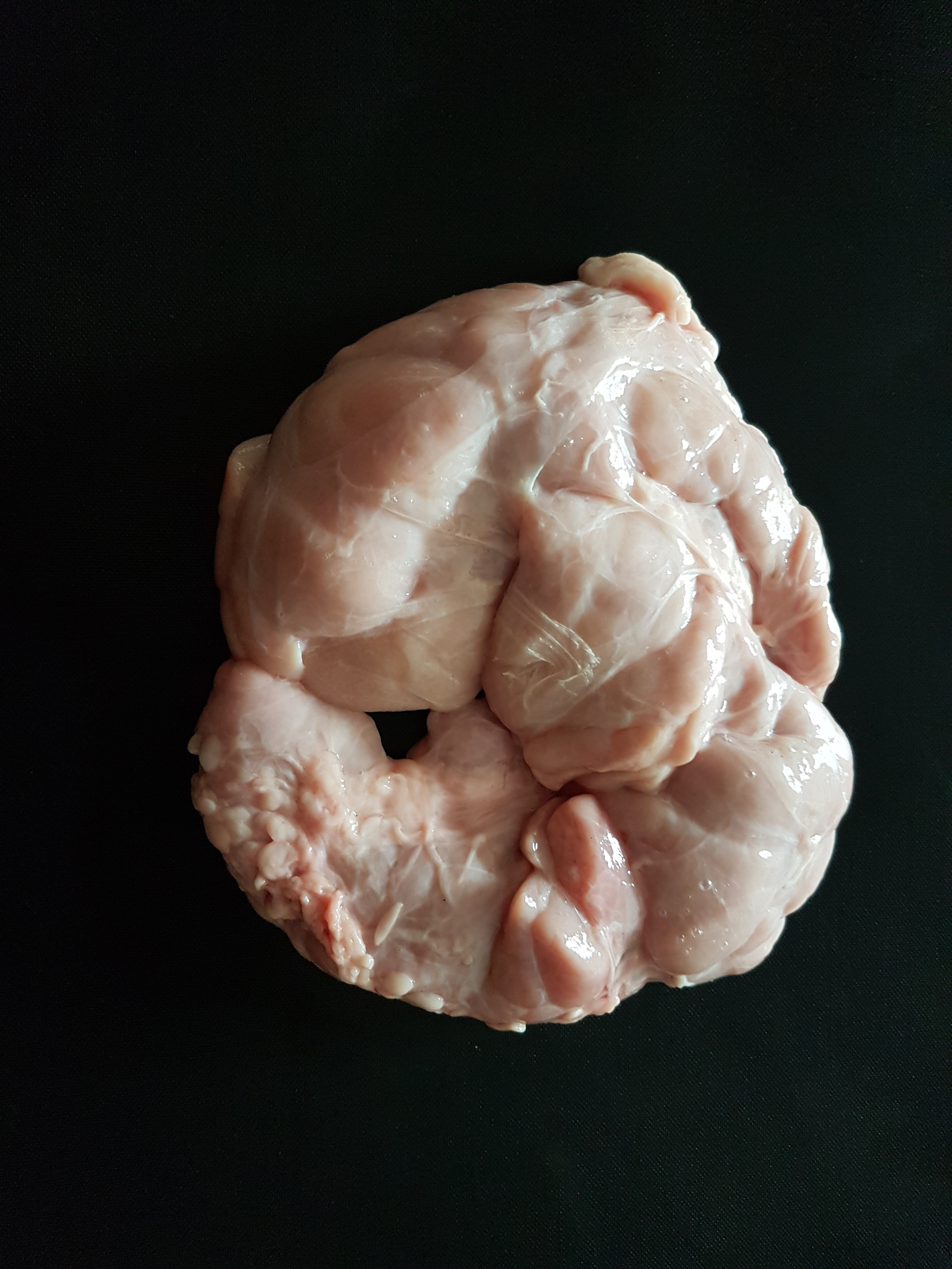 engl. Sweetbread, frz. Ris de veau, span. Lechecillas